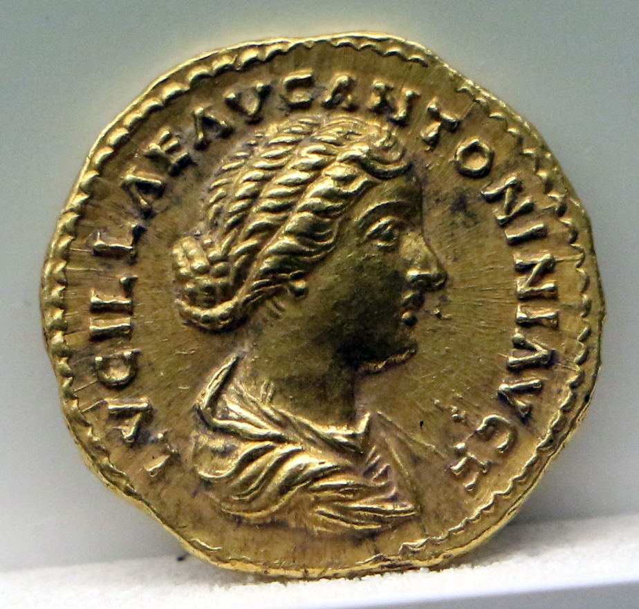 Museo Archeologico Nazionale di Aquileia This is a photo of a monument which is part of cultural heritage of Italy.